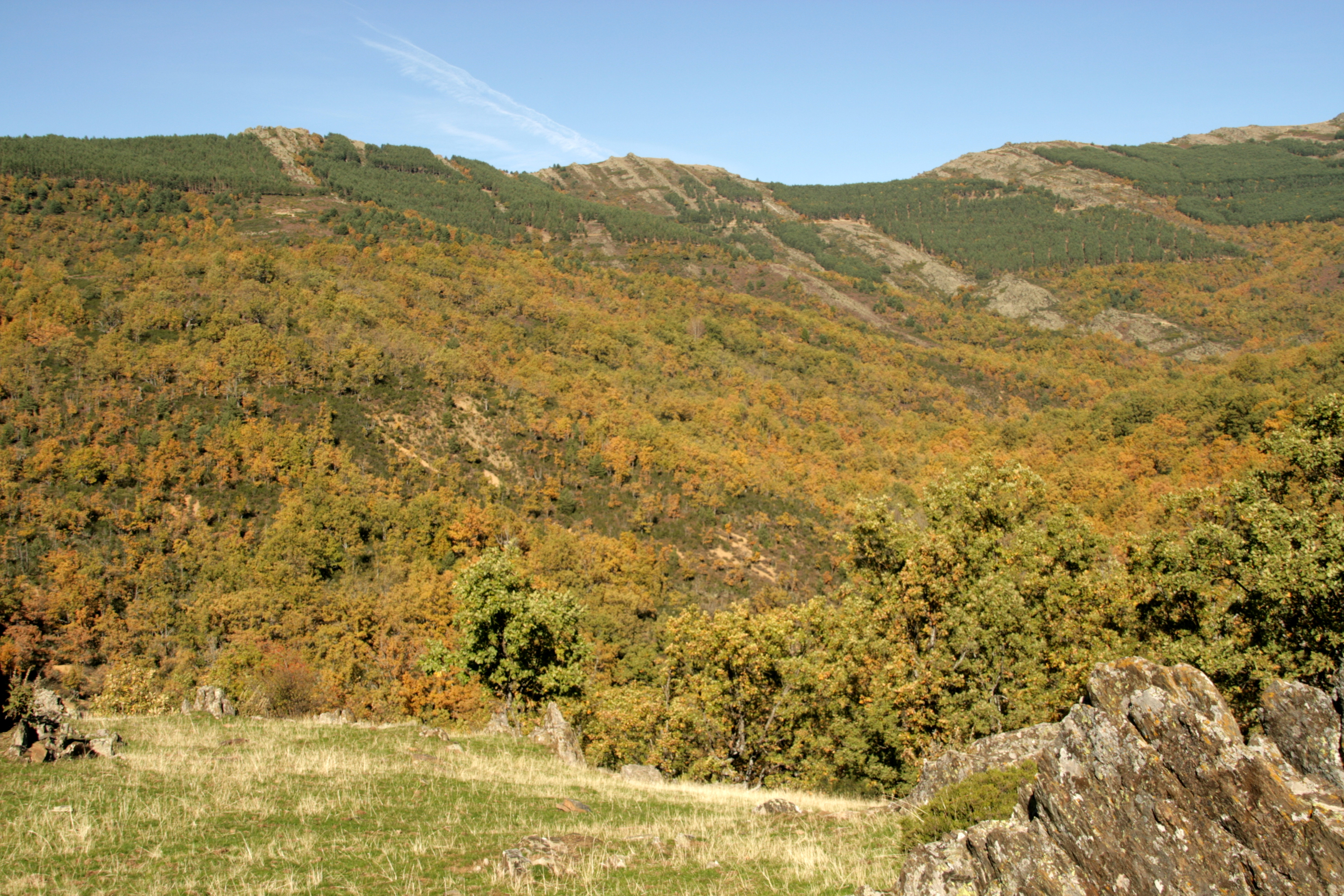 Senda de los Robles Centenarios en Puebla de la Sierra This is a photography of a Special Area of Conservation in Spain with the ID: ES3110002. Natura2000 entry, EEA entry